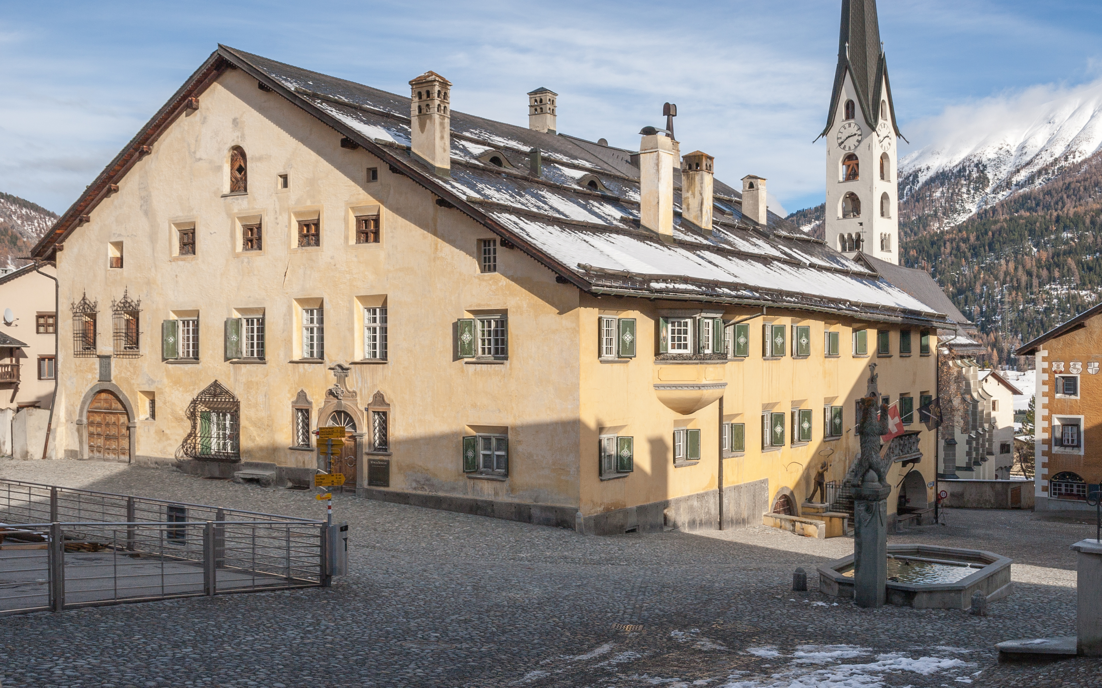 Oberes und Unteres Planta-Haus in Zuoz, Engadin